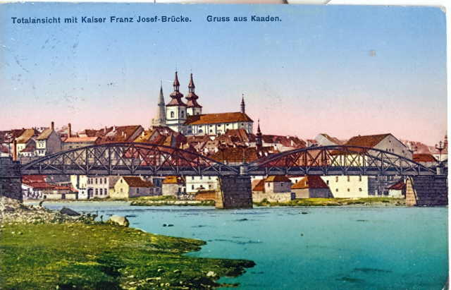 a colored postcard